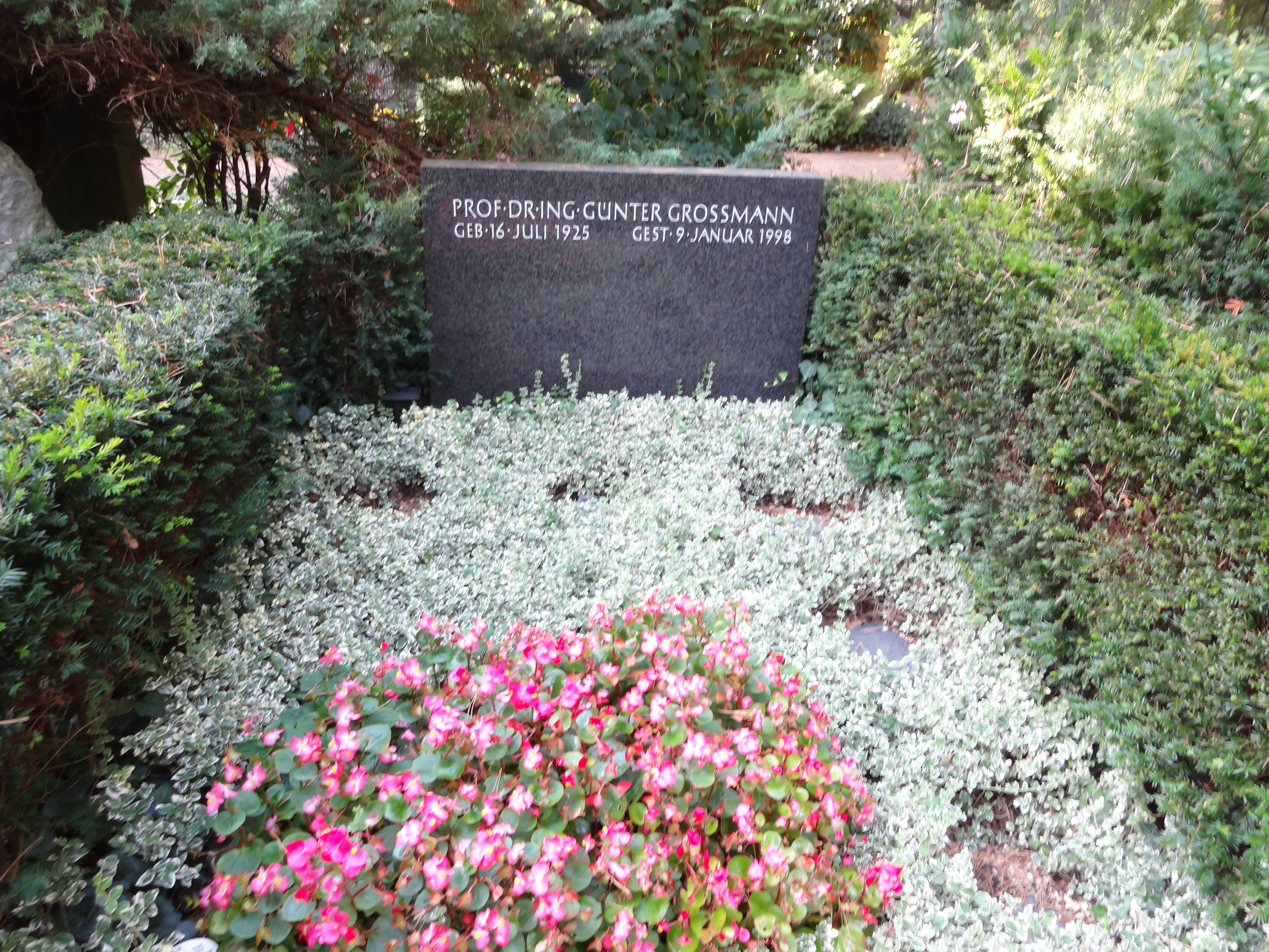 Grab von Prof. Günter Grossmann auf dem Waldfriedhof Dahlem in Berlin